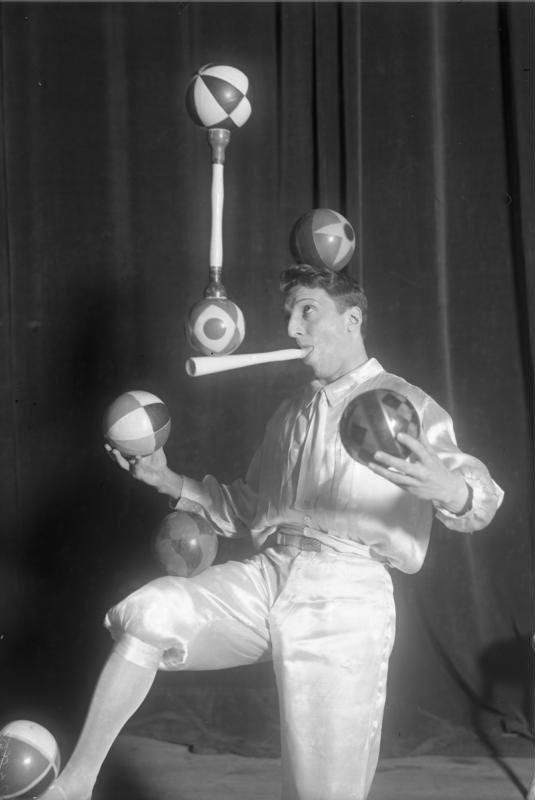 Der Wunderjongleur Enrico Rastelli ist tot! Der in der ganzen Welt bekannte Meister der Jongleurkunst Rastelli bei der Ausübung eines schwierigen Tricks. Rastelli ist in Italien an einem Gehirnschlag plötzlich verstorben.